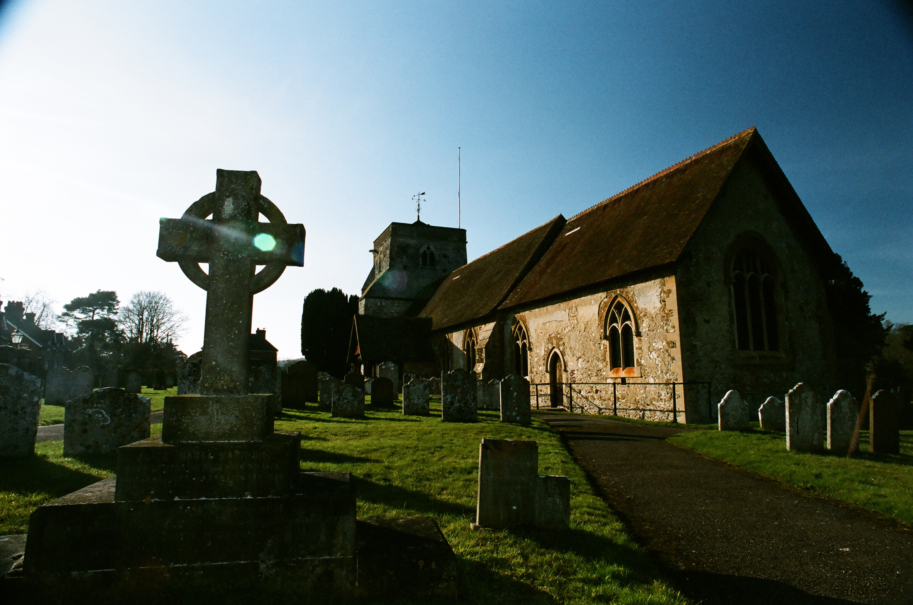 Nikon F80 Nikkor 20mm f/2.8 AF-D Fuji Superia 400